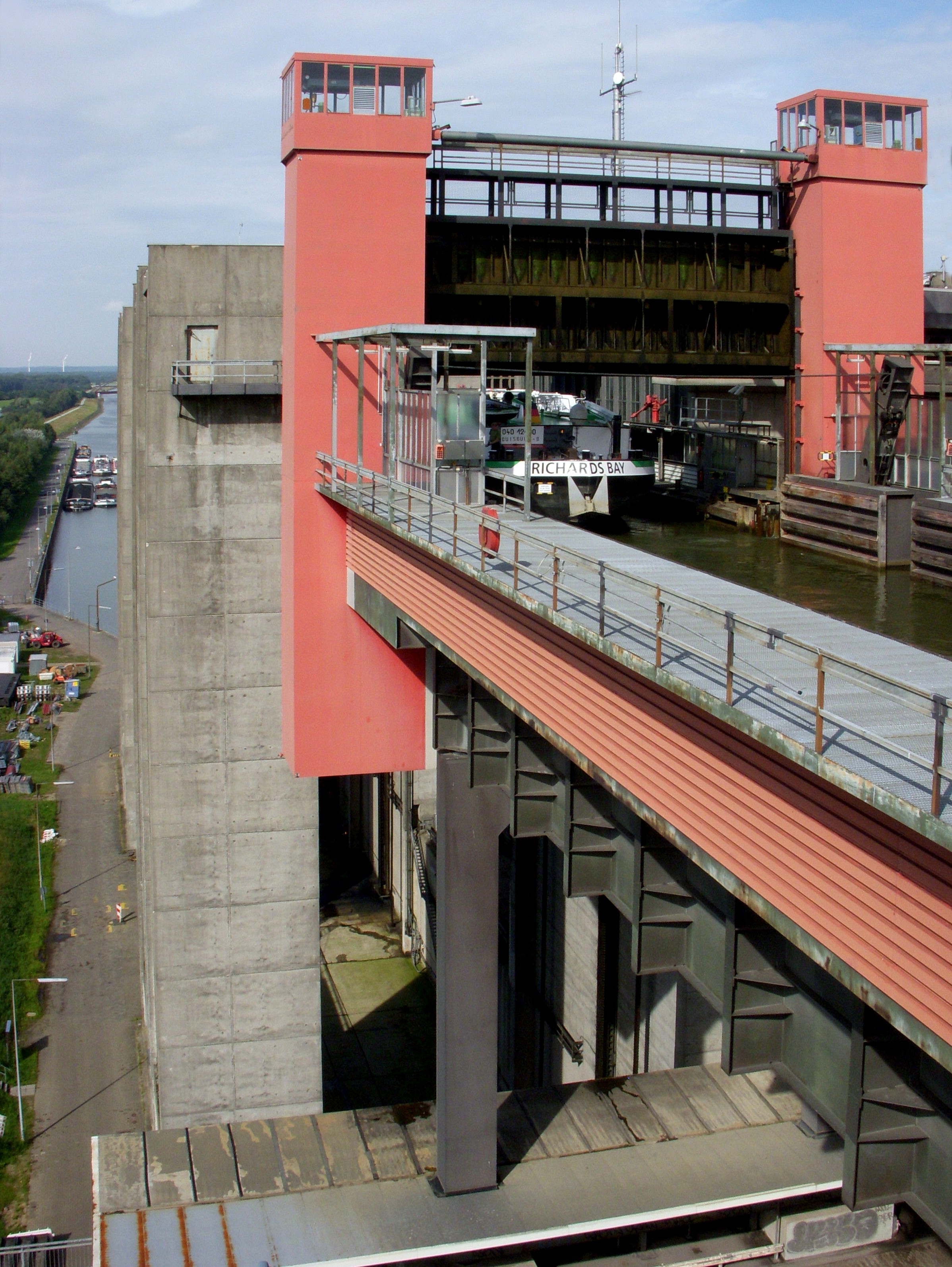 Schiffshebewerk Scharnebeck